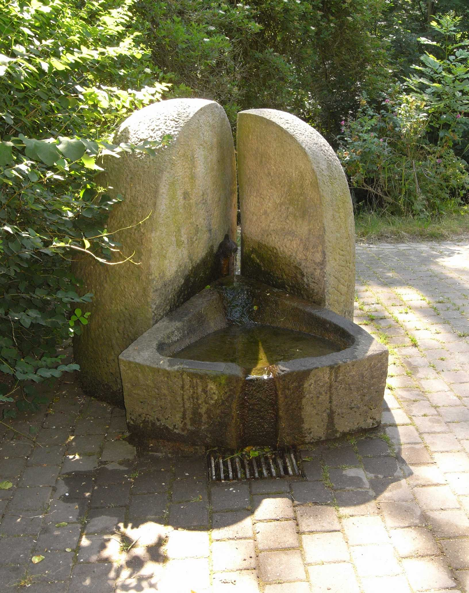 Sandsteinbrunnen im Tal des Heiligen Borns (Dresden, Leubnitz-Neuostra), 1992